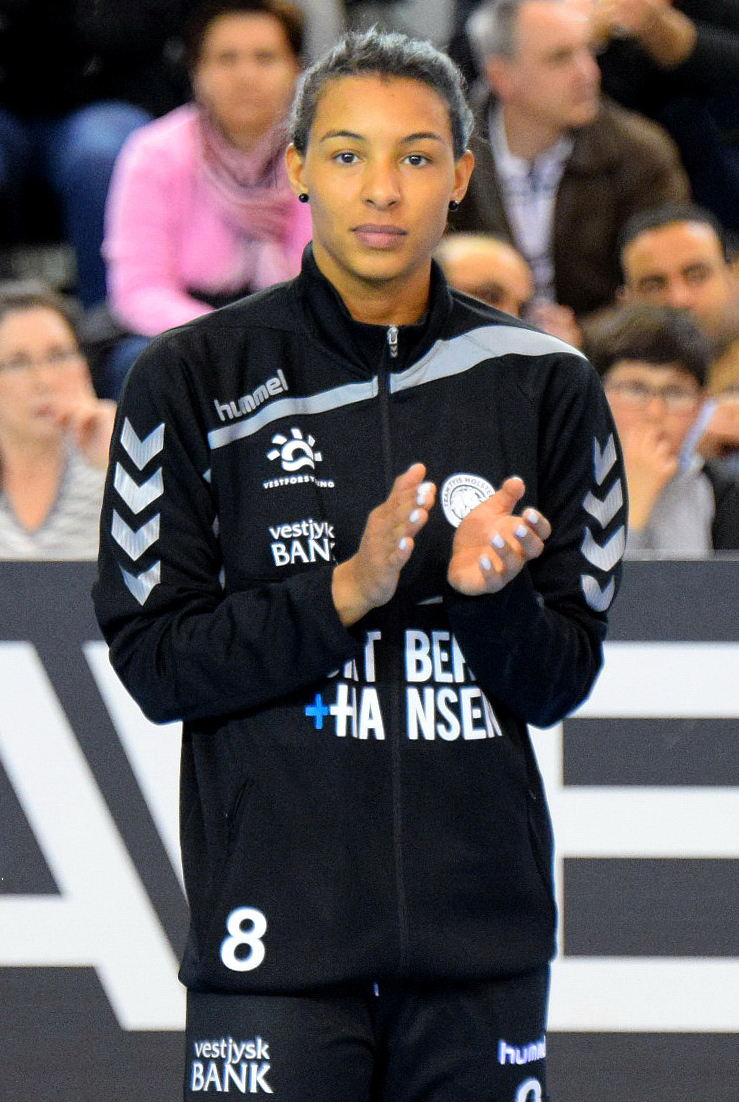 Jamina Roberts Le 03 avril 2016 lors du match aller de demi-finale de la Coupe des vainqueurs de coupe de handball Issy Paris Hand / Team Tvis Holstebro